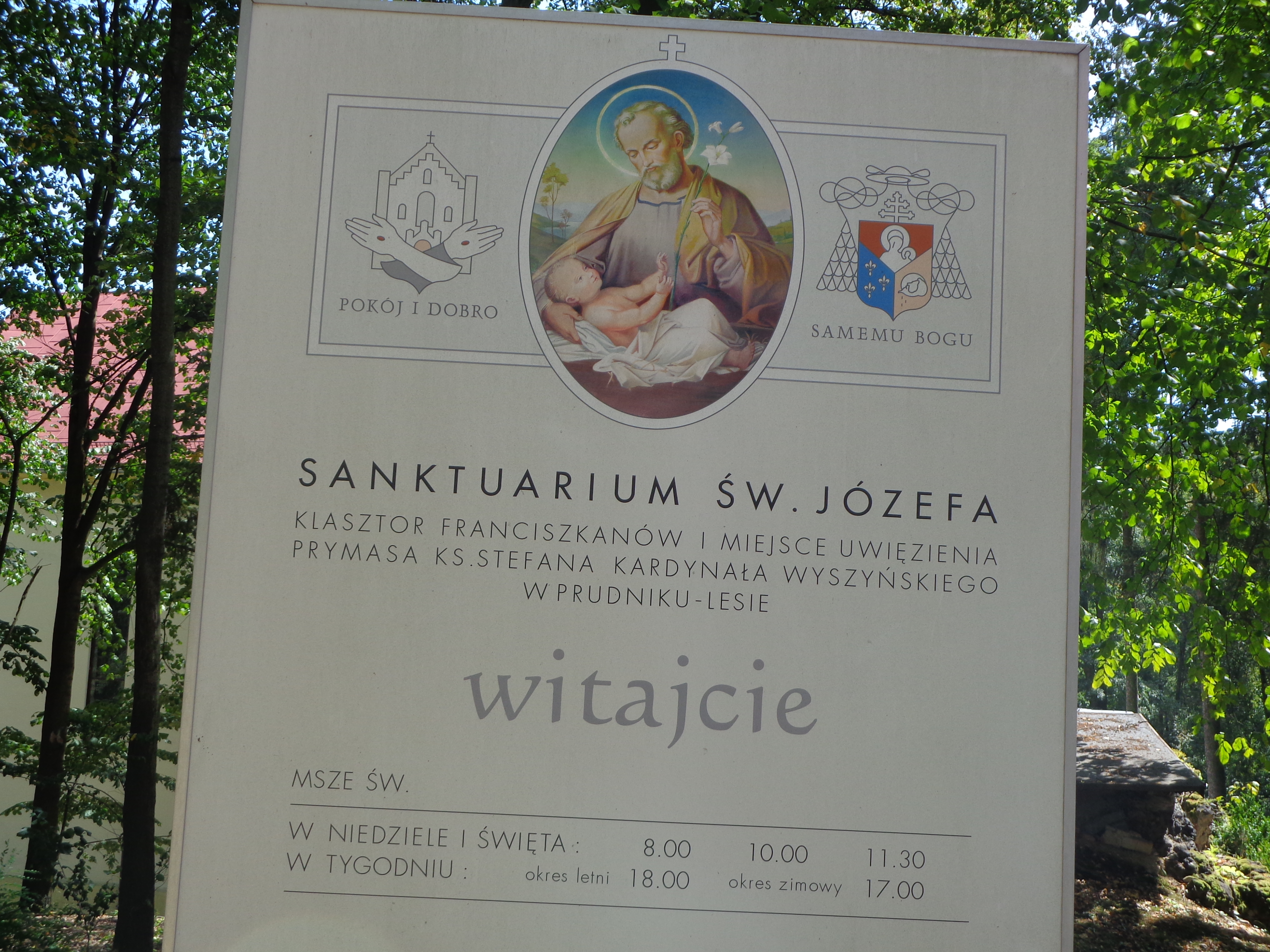 Tablica powitalna przed sanktuarium św. Józefa w Prudniku-Lesie.